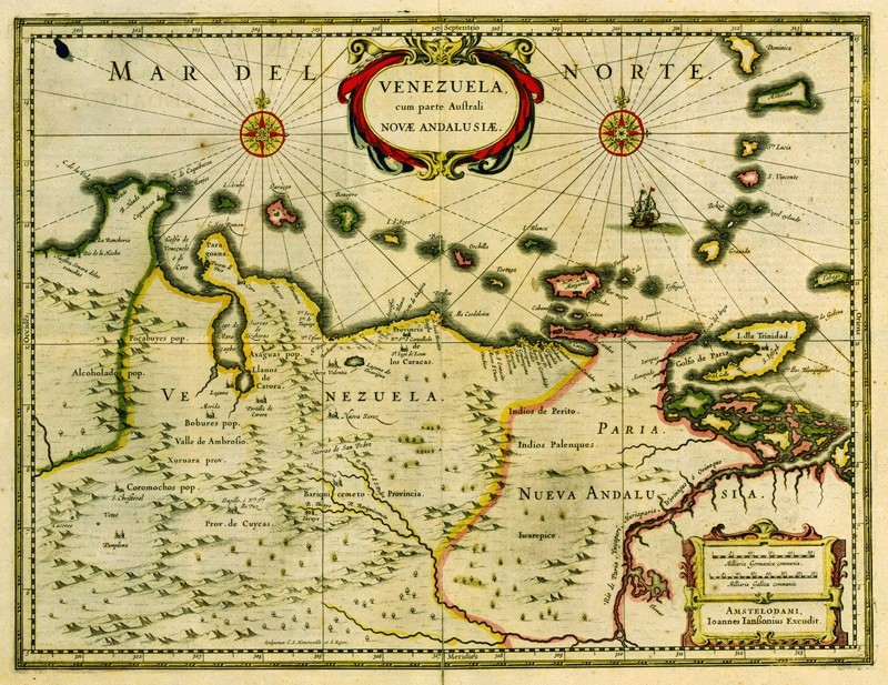 Venezuela cum parte Auftrali Novae Andalusiae (La provincia de Venezuela y la parte austral de Nueva Andalucía). Mapa del año 1635.